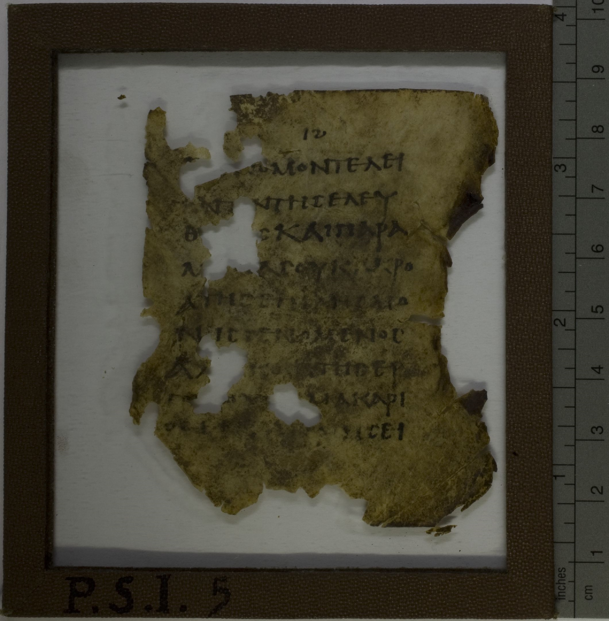 Uncial 0173 (Gregory-Aland); manuscript of the New Testament with text of James 1:25-27; 5th century